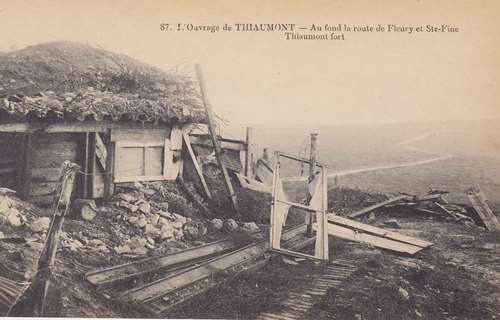 Carte postale - Ouvrage de Thiaumont